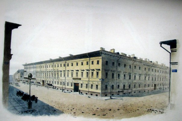 Ордонанс-Гауз (1853). Михайловская площадь; восточный квартал с Садовой улицы.